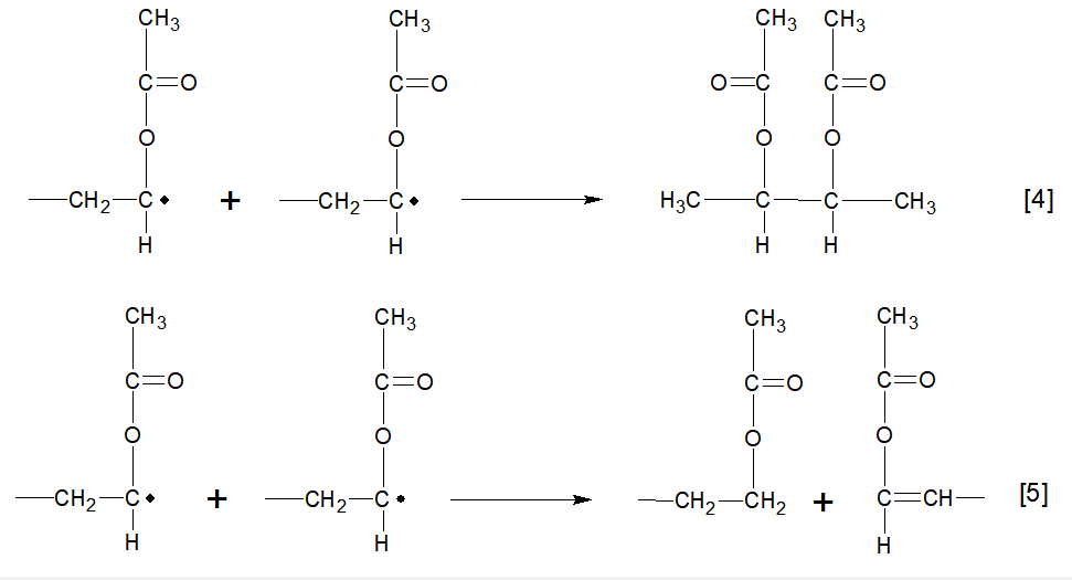 Reação de combinação e de desproporcionamento